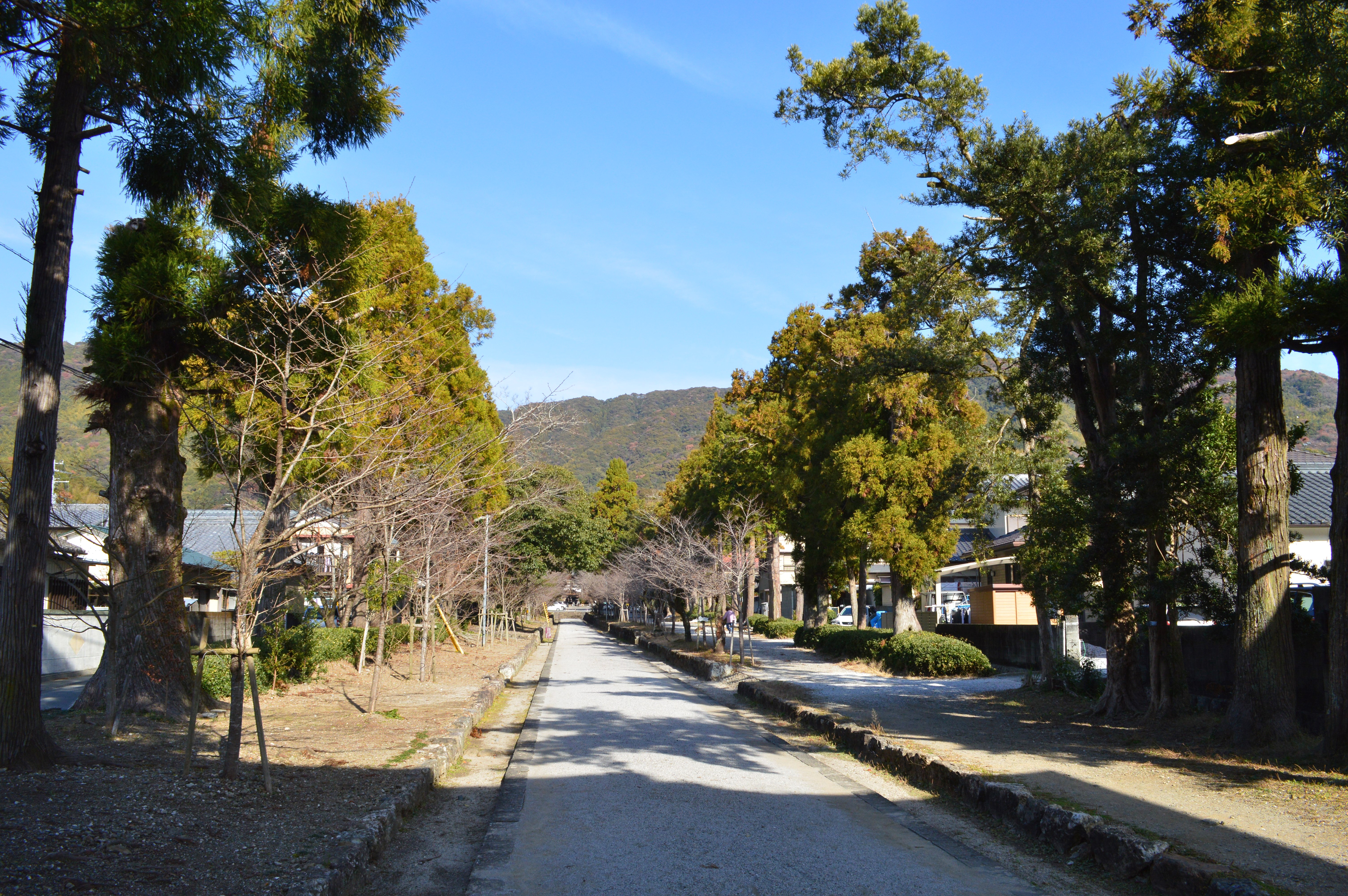 土佐神社 表参道